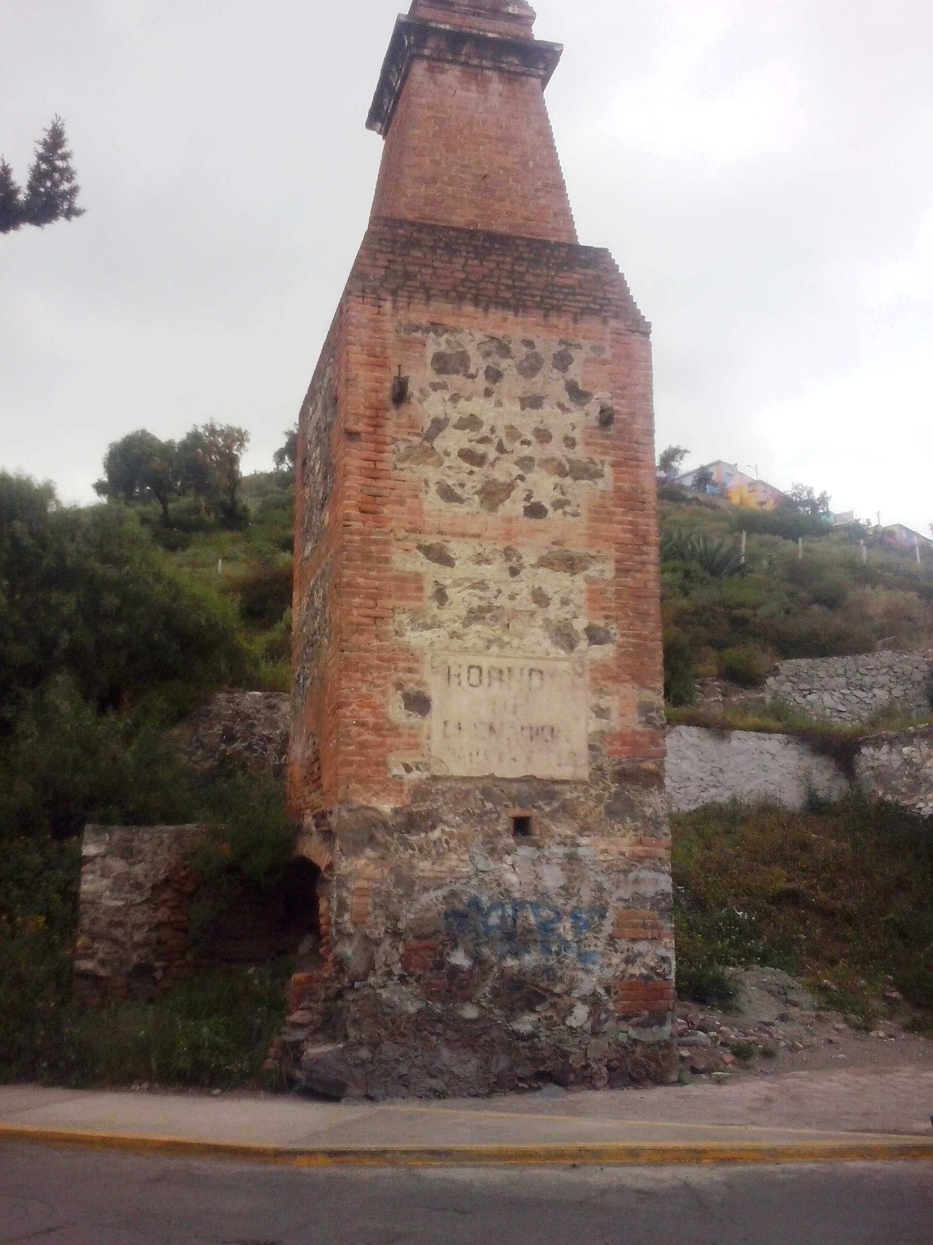 Horno crematorio en Pachuca, México